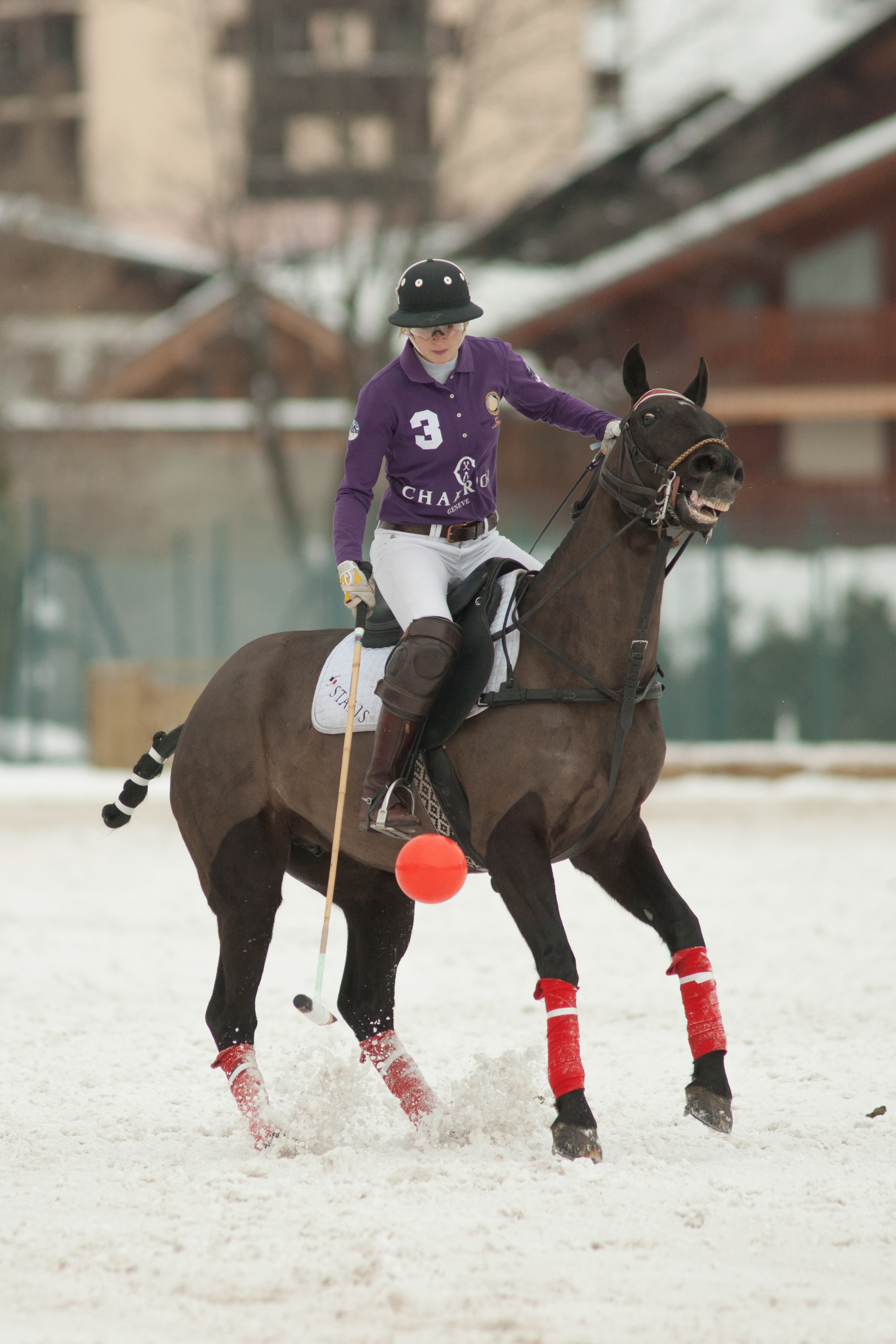 BMW Polo Masters Megève 2014 - Charriol vs Scapa